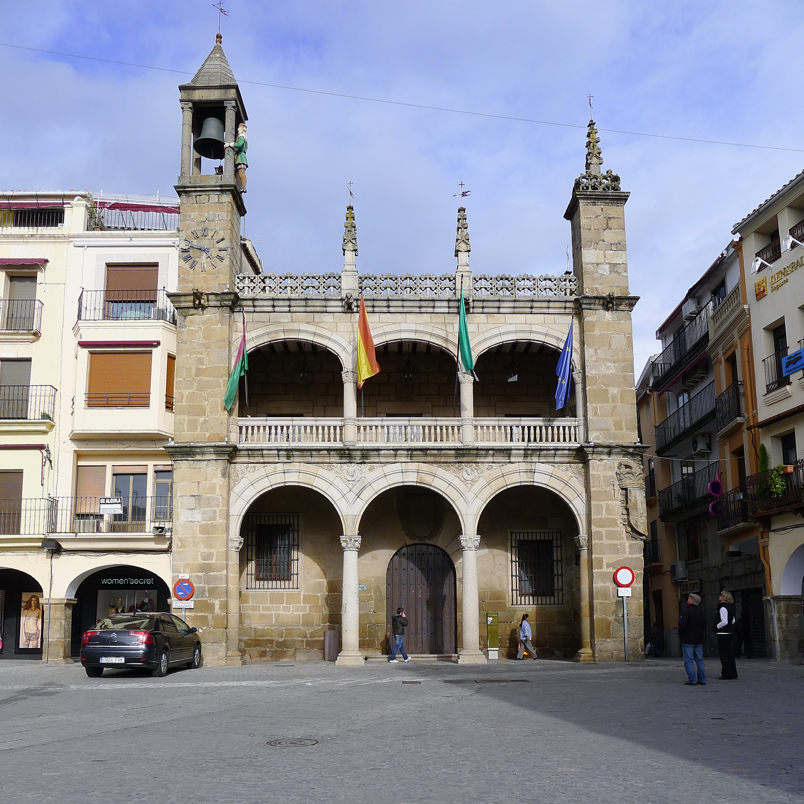 José Manuel González Valcárcel reconstruye el edificio de Juan de Álava